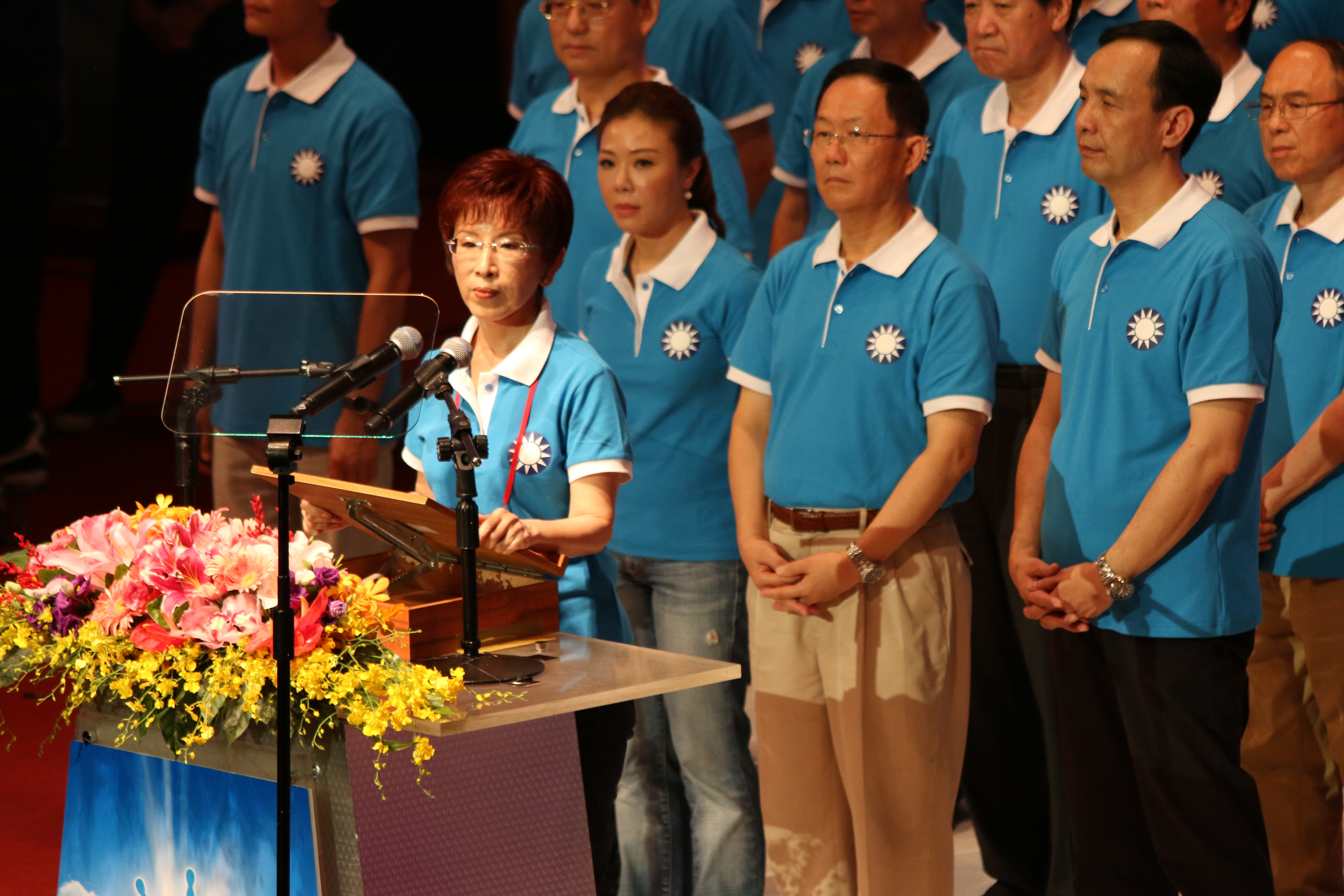 中文（台灣）: 國民黨總統候選人洪秀柱發表演講(右一為黨主席朱立倫美國之​​音楊明拍攝)